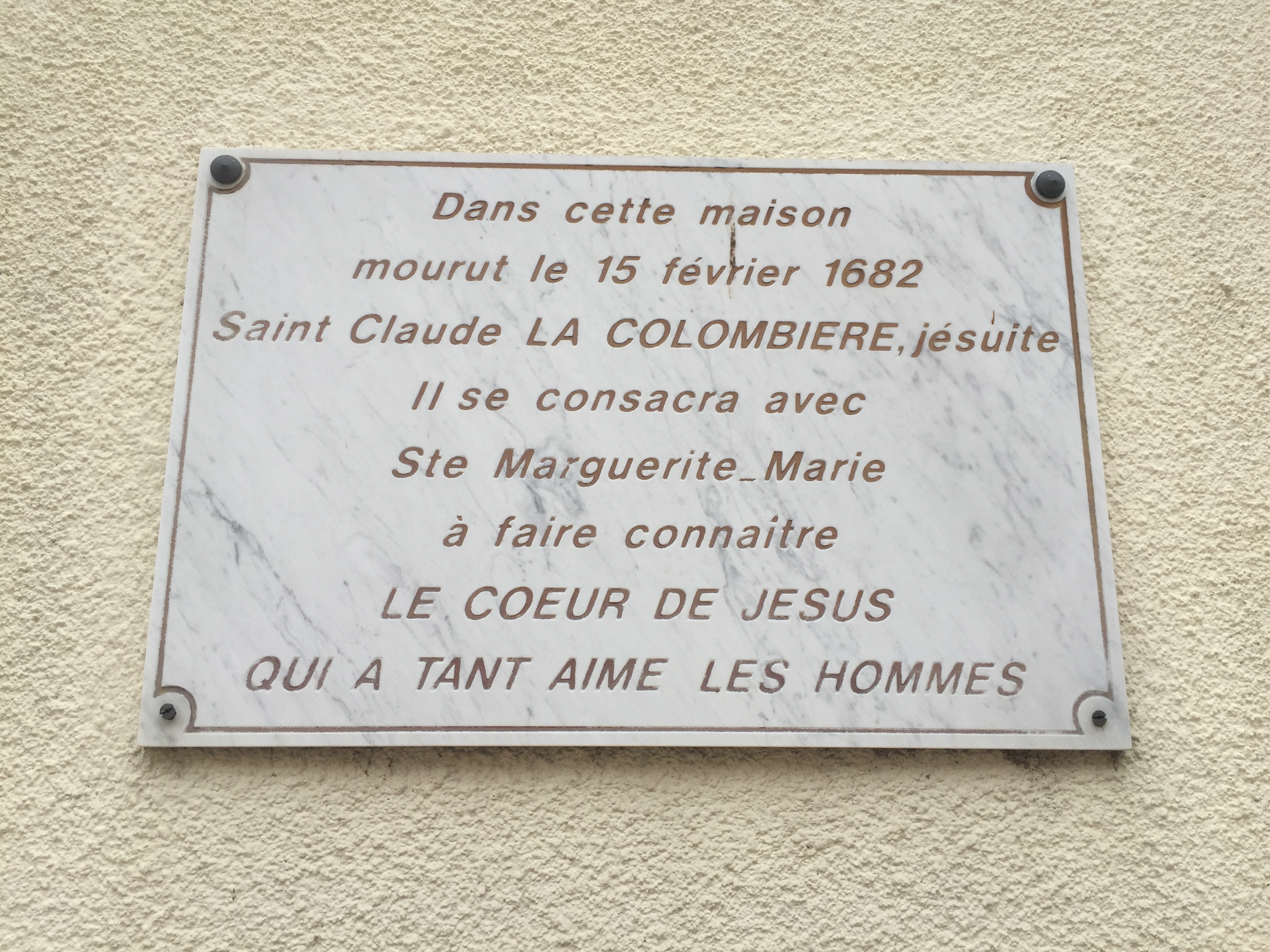 Image de Paray-le-Monial, Saône-et-Loire, France.